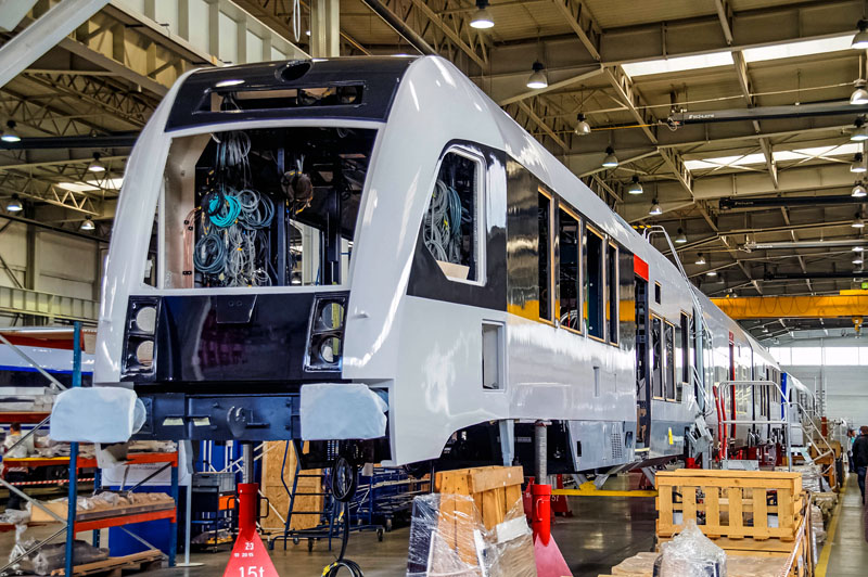 Spalinowy zespół trakcyjny SA136-019 podczas produkcji w zakładach Pesa Bydgoszcz.